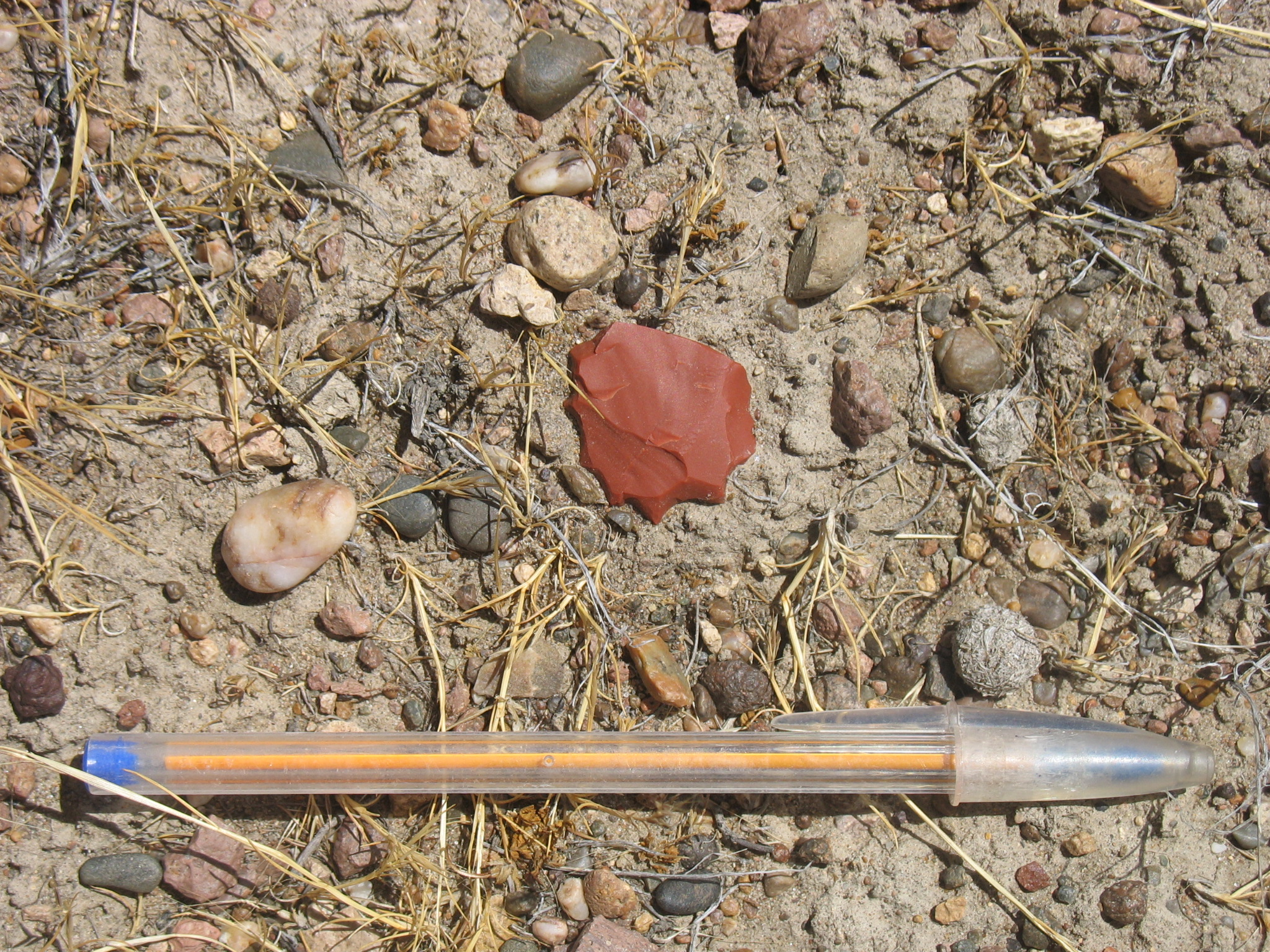 Instrumento lítico denticulado in situ hallado cerca de Puerto Deseado, en la costa norte de la provincia de Santa Cruz (Argentina).